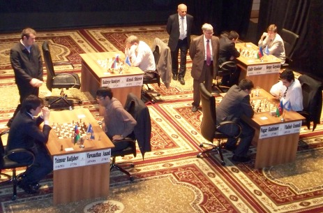 сборная Азербайджана - сборная Мира (шахматы)